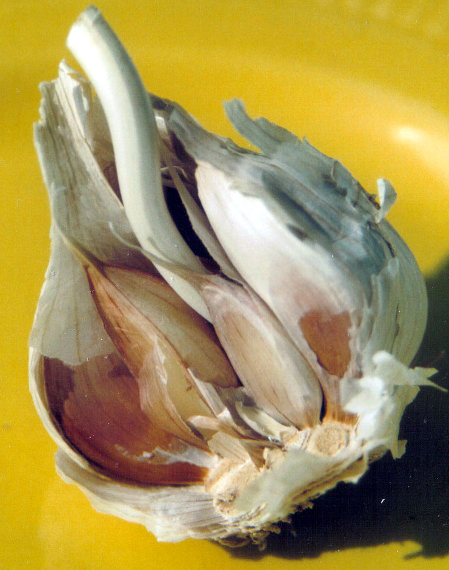 allium sativum